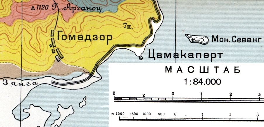 Остров Севан на озере Севан на карте 1927 года.